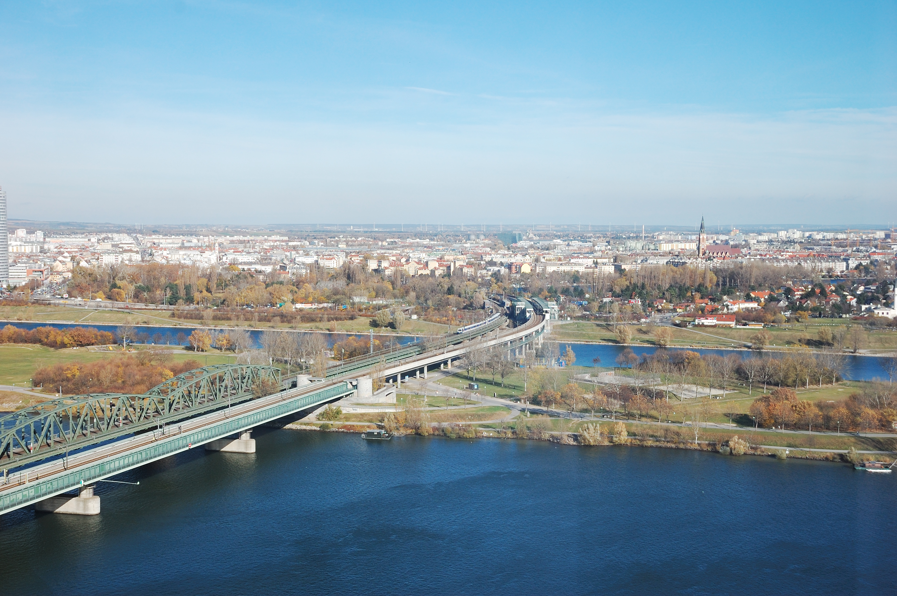 Danube